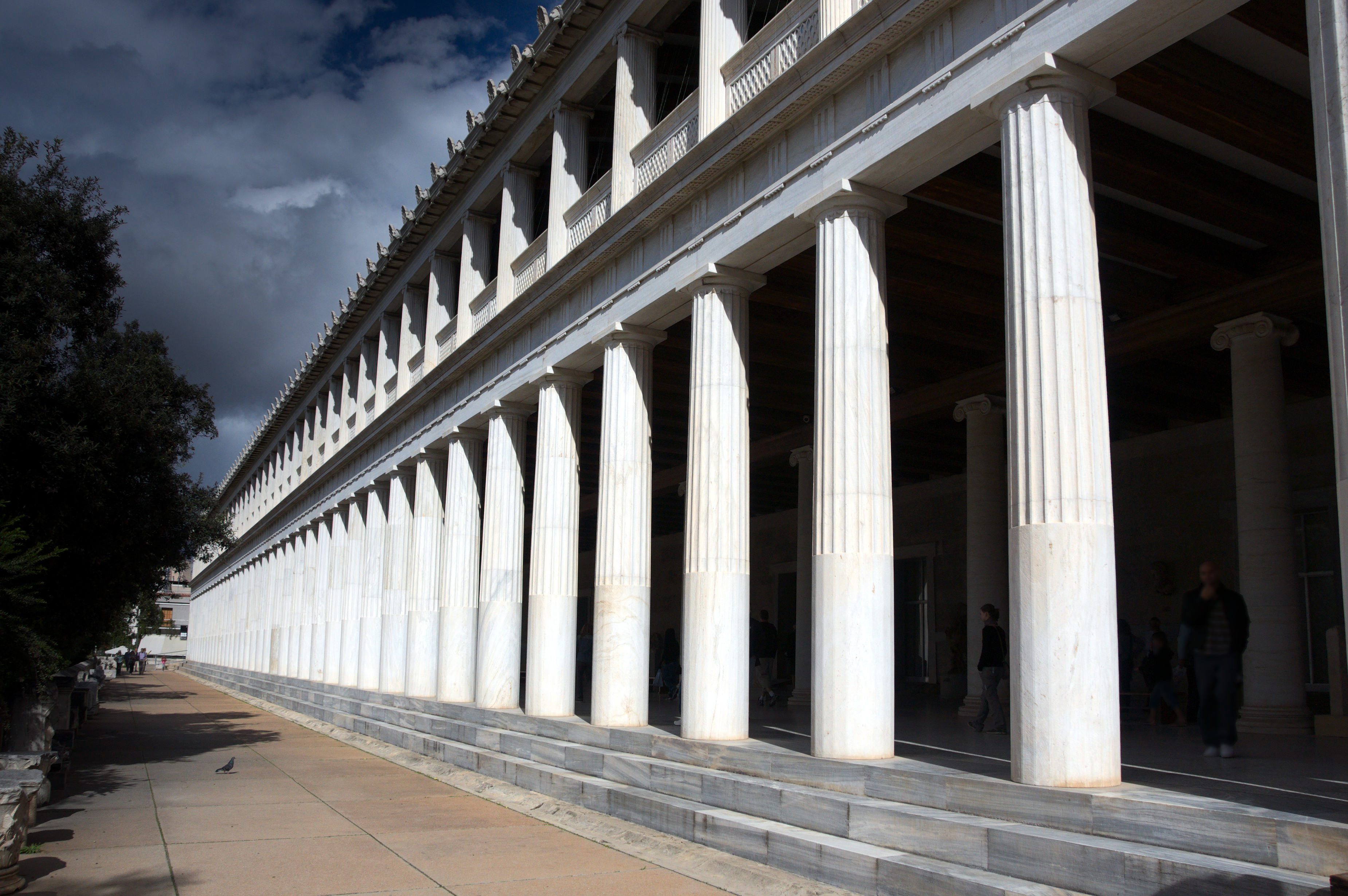 Στοά Αττάλου«Στοά Αττάλου»